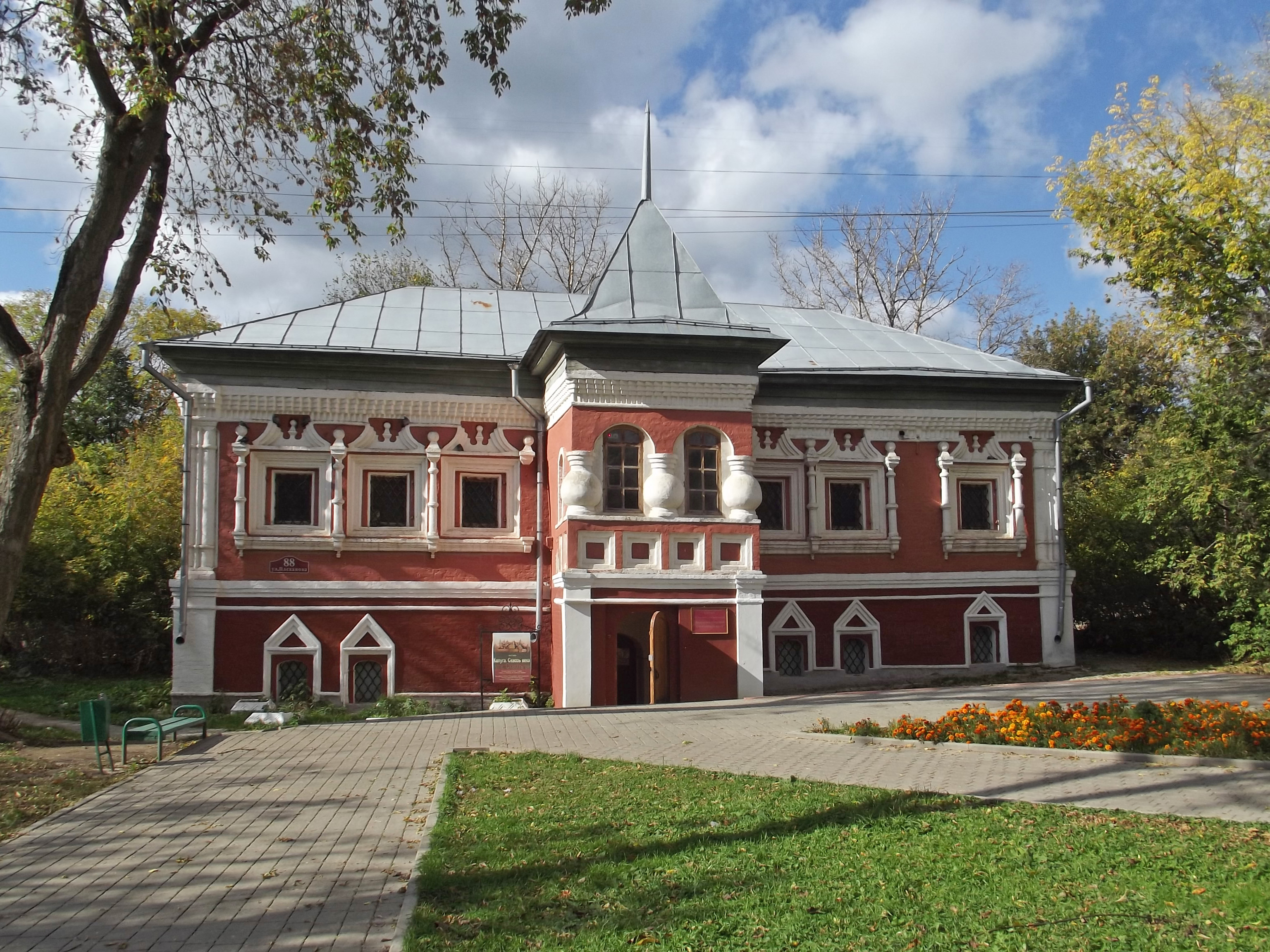 Палаты купцов Коробовых